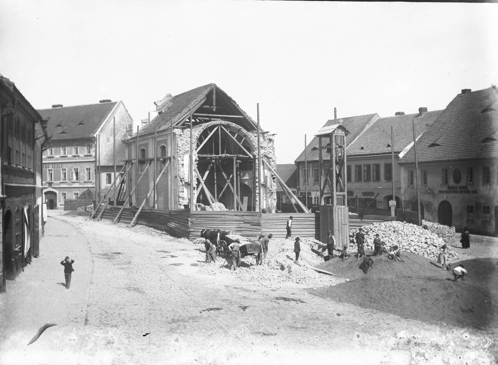 Přestavba kostela svatého Jana Nepomuckého v Rožmitále pod Třemšínem